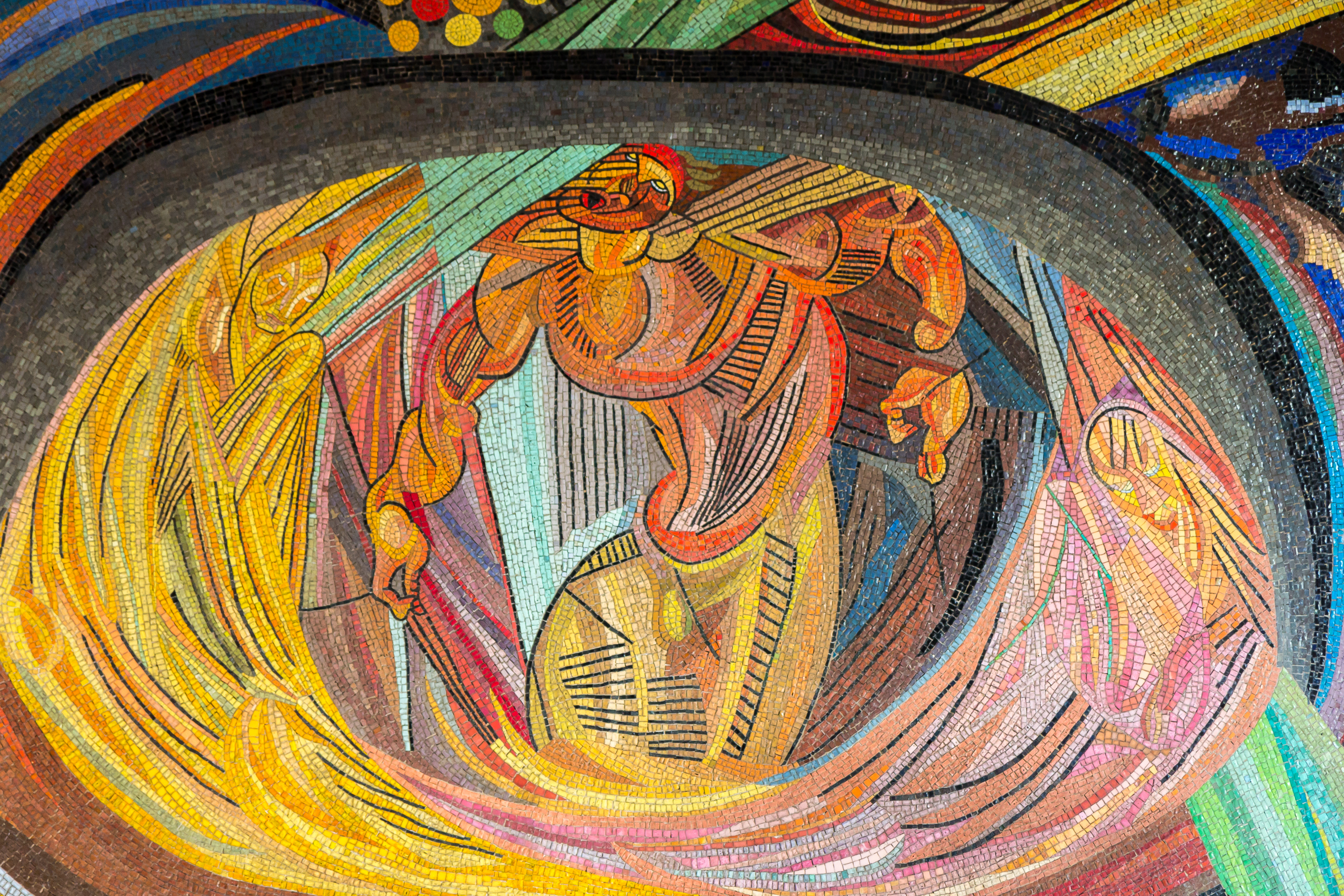 Wiederentdeckung des Otto-Freundlich-Mosaik „Die Geburt des Menschen“